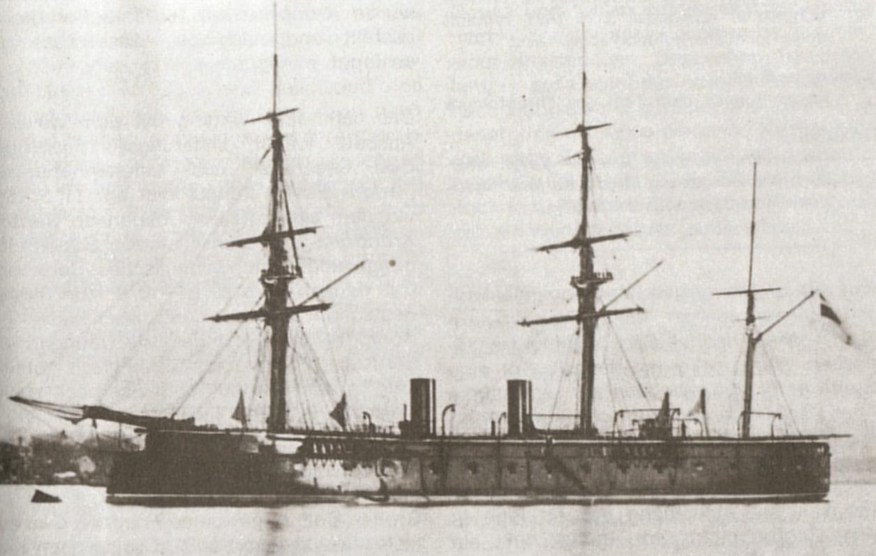 Das deutsche Panzerschiff SMS Kronprinz im Jahr 1876 mit gekürzter Takelage.